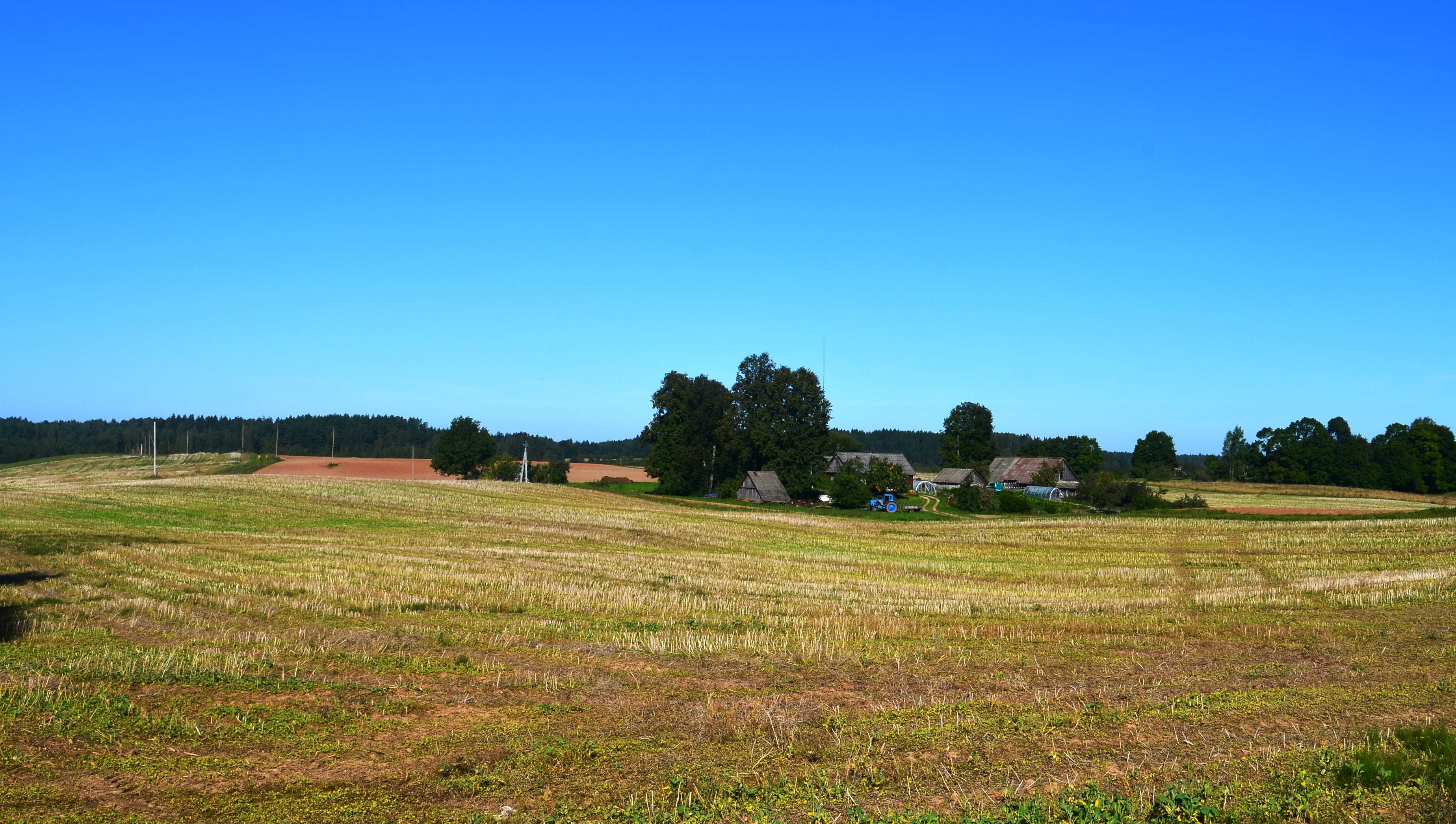 Bieliūnai, Zarasų raj.